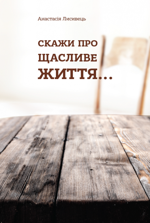 Обкладинка книги Анастасії Лисивець "Скажи про щасливе життя...". Упорядкувала – Наталка Білоцерківець.